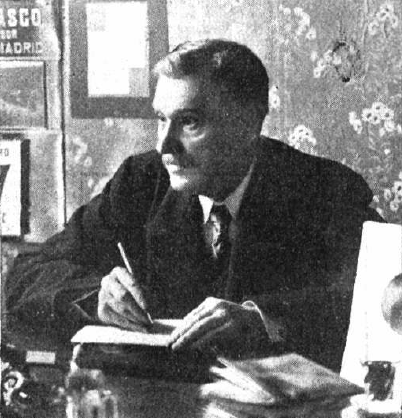 Fotografía del periodista español José Estrañi y Grau, director de El Cantábrico publicada en 1912.